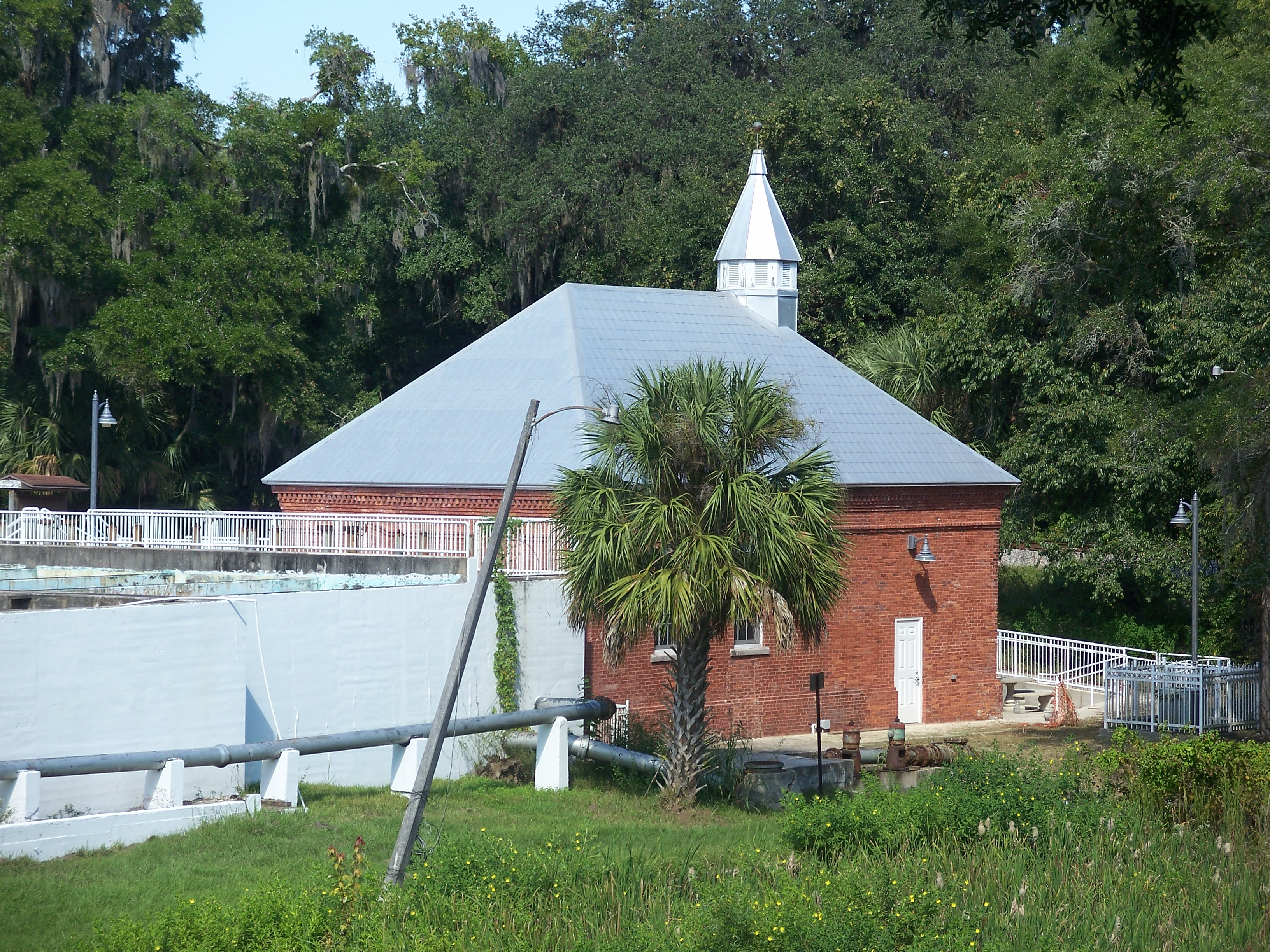 Palatka, Florida: Waterworks